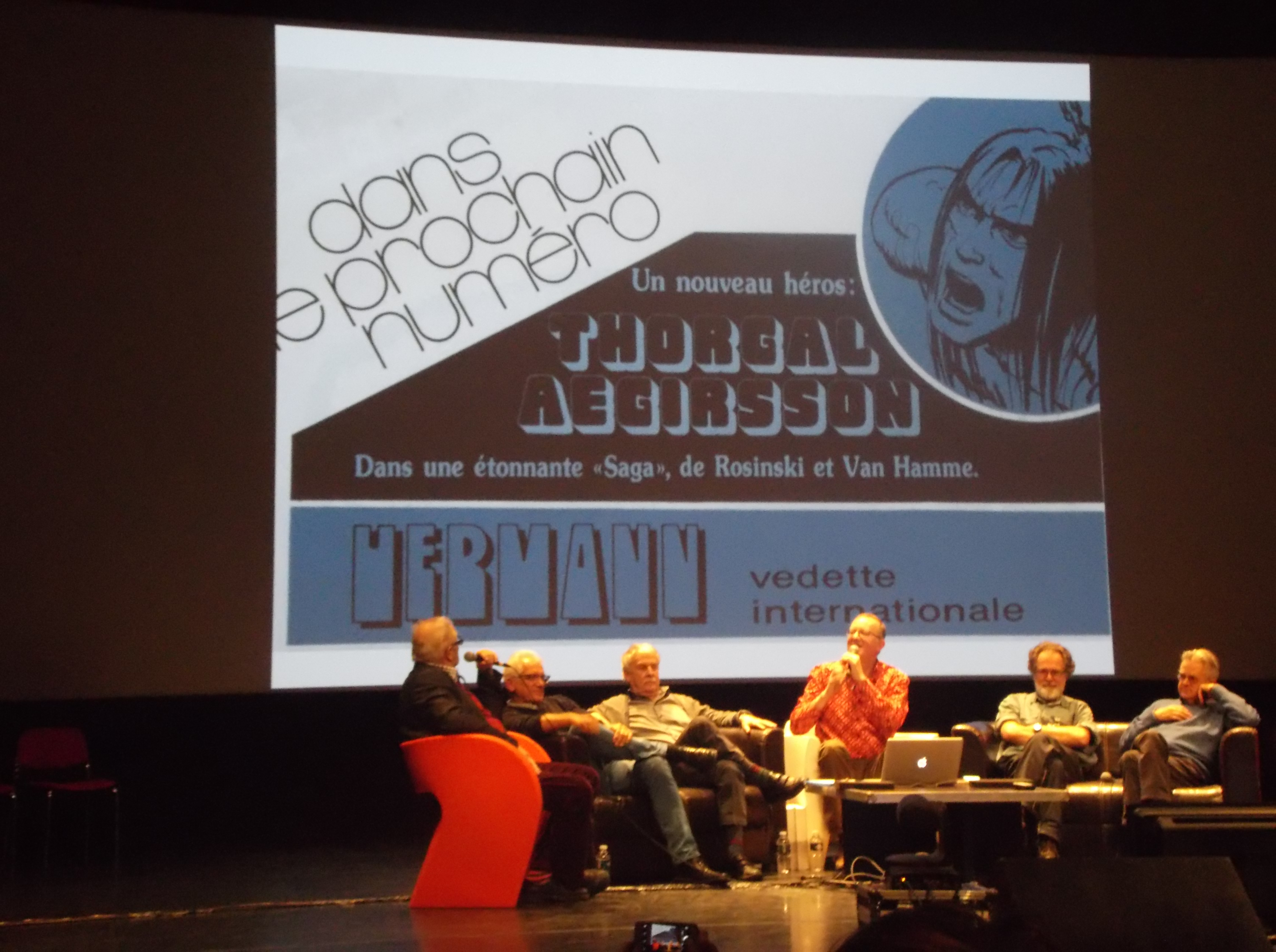 Grzegorz Rosiński au festival de la bande dessinée d'Angoulême en France le 28 janvier 2017, lors d'une table ronde revenant sur l'histoire des magazines "Spirou" et "Tintin". Grzegorz Rosiński se trouve à gauche de la photo (pour les spectateurs). De gauche à droite : Grzegorz Rosiński, (Dany ?), Herrmann, Thierry Tinlot, Frank Pé, Frédéric Jannin.